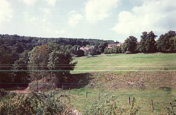 Deze foto heb ik zelf gemaakt in 1992.